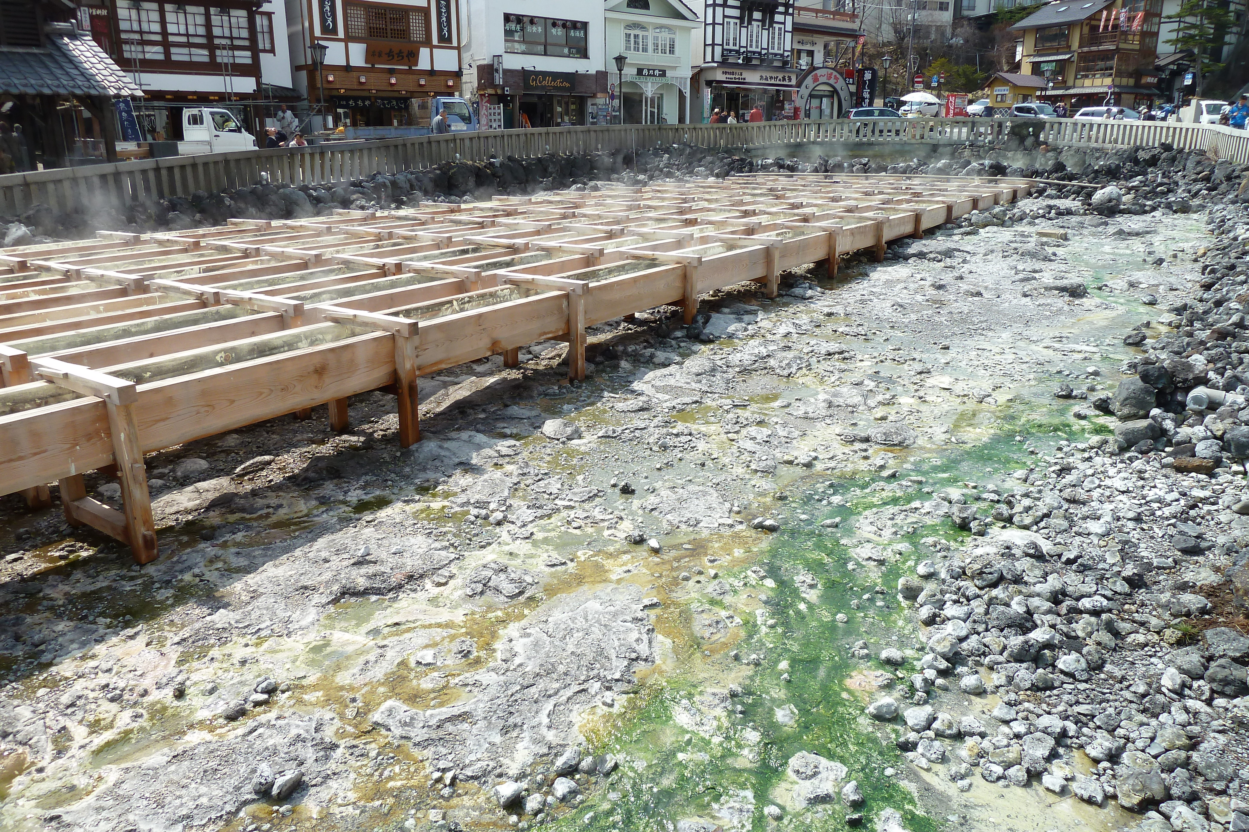 湯畑